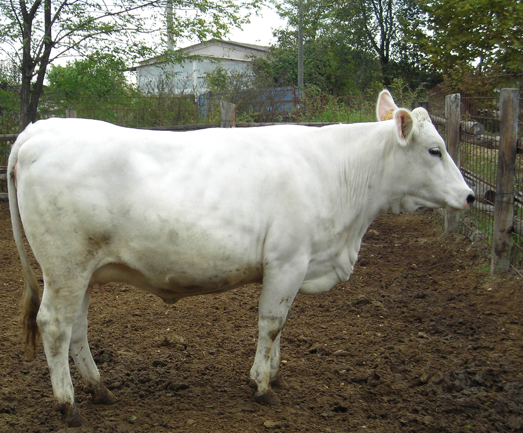 Manza di razza bovina Bianca Val Padana